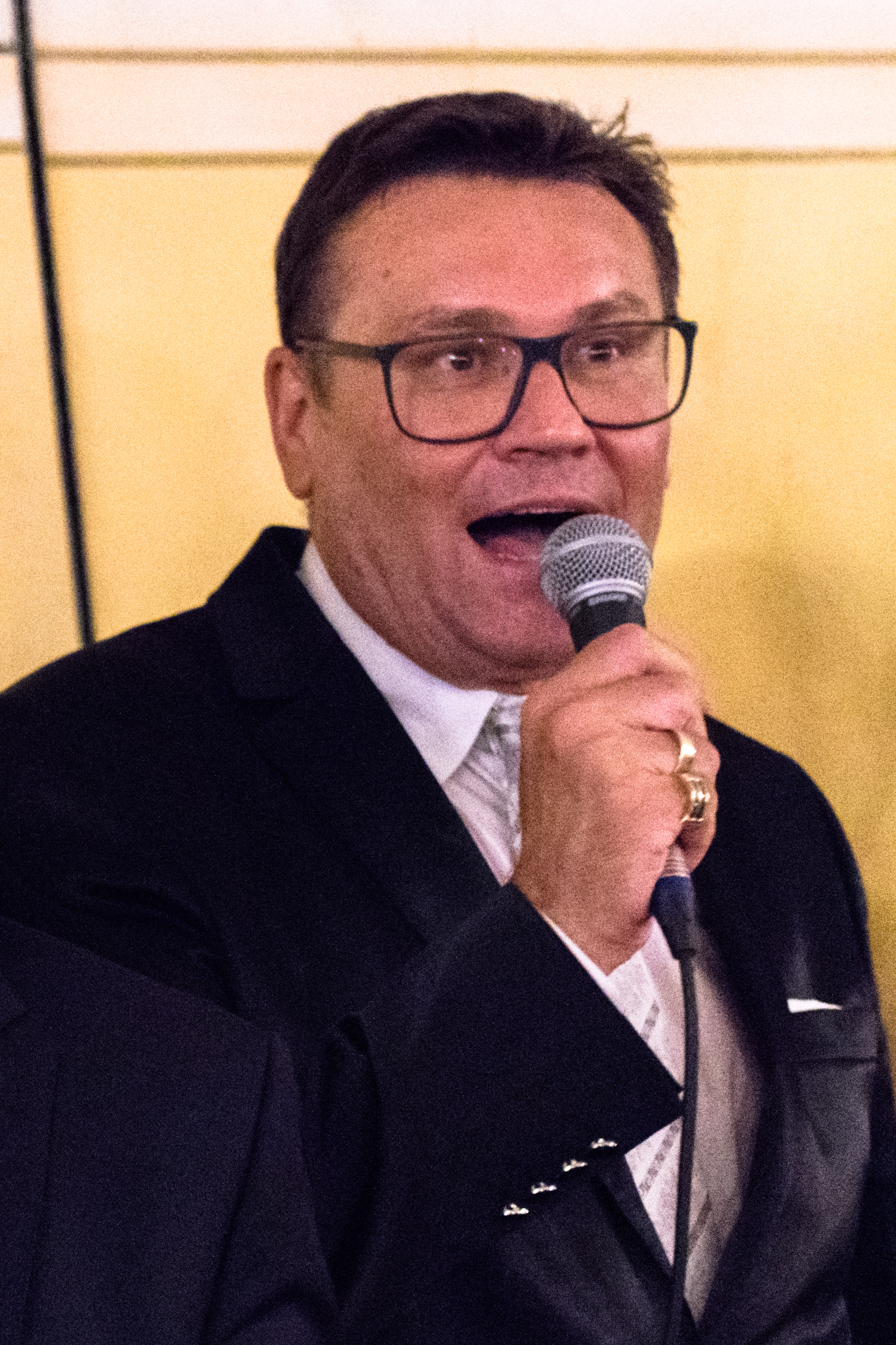 Michael Lakner, Intendant des Stadttheater Baden